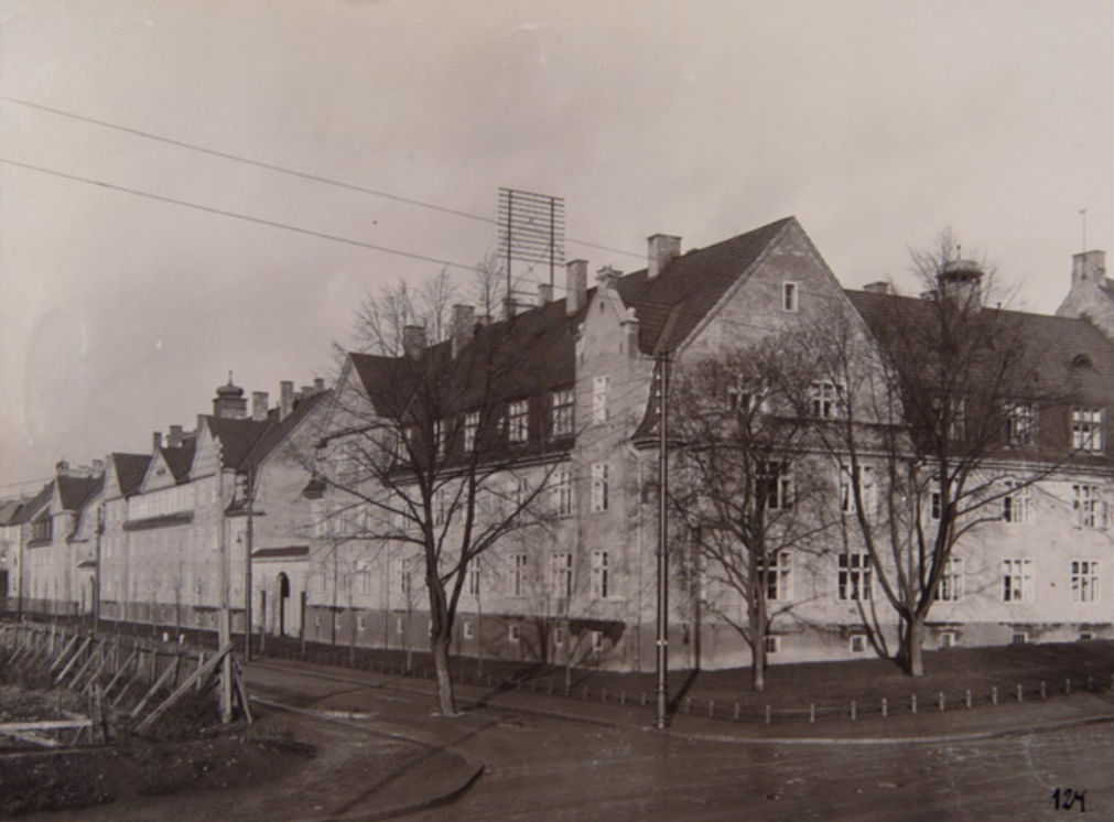 Boliger i Lindern hageby, fasade mot Ole Jacob Brochs gate (navn fra 1936), fotografert sannsynligvis på 1920-tallet.